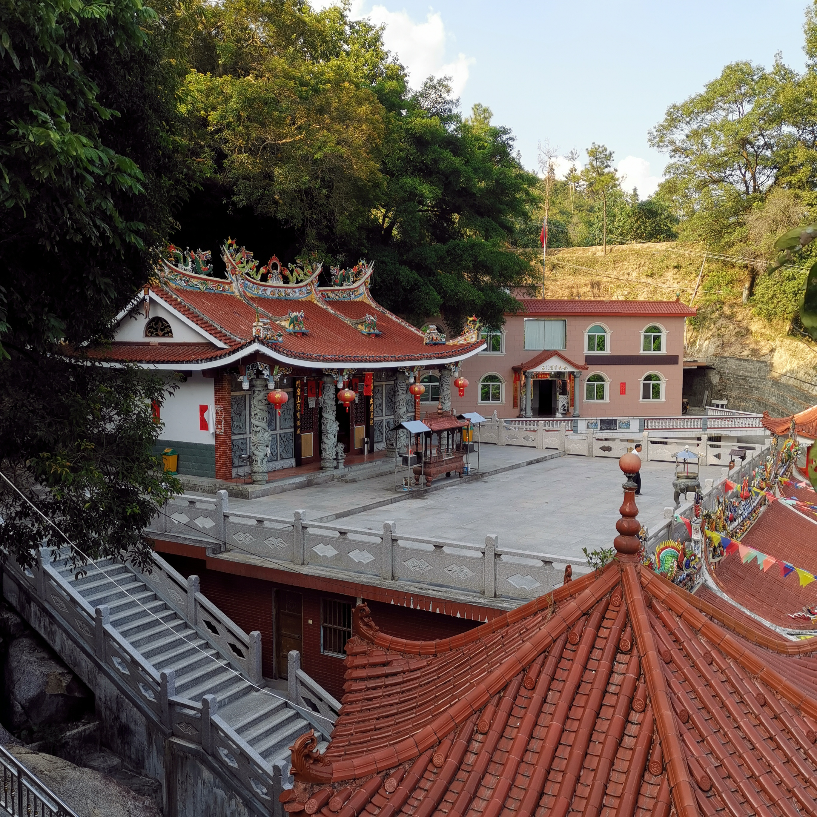 中文（中国大陆）: 南靖船场镇梧宅石门岩